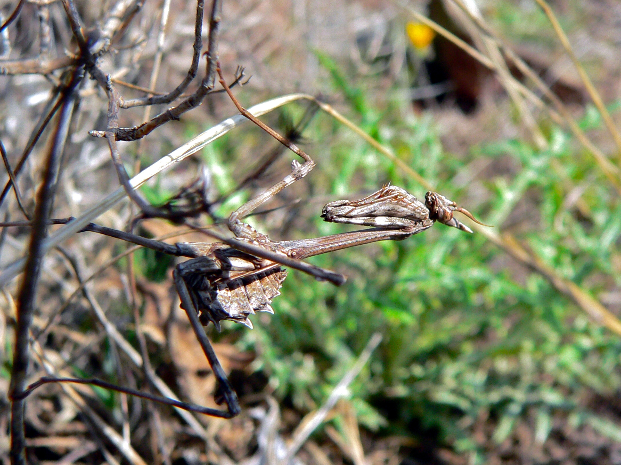 La Lieude, Mérifons, Hérault, FRANCE